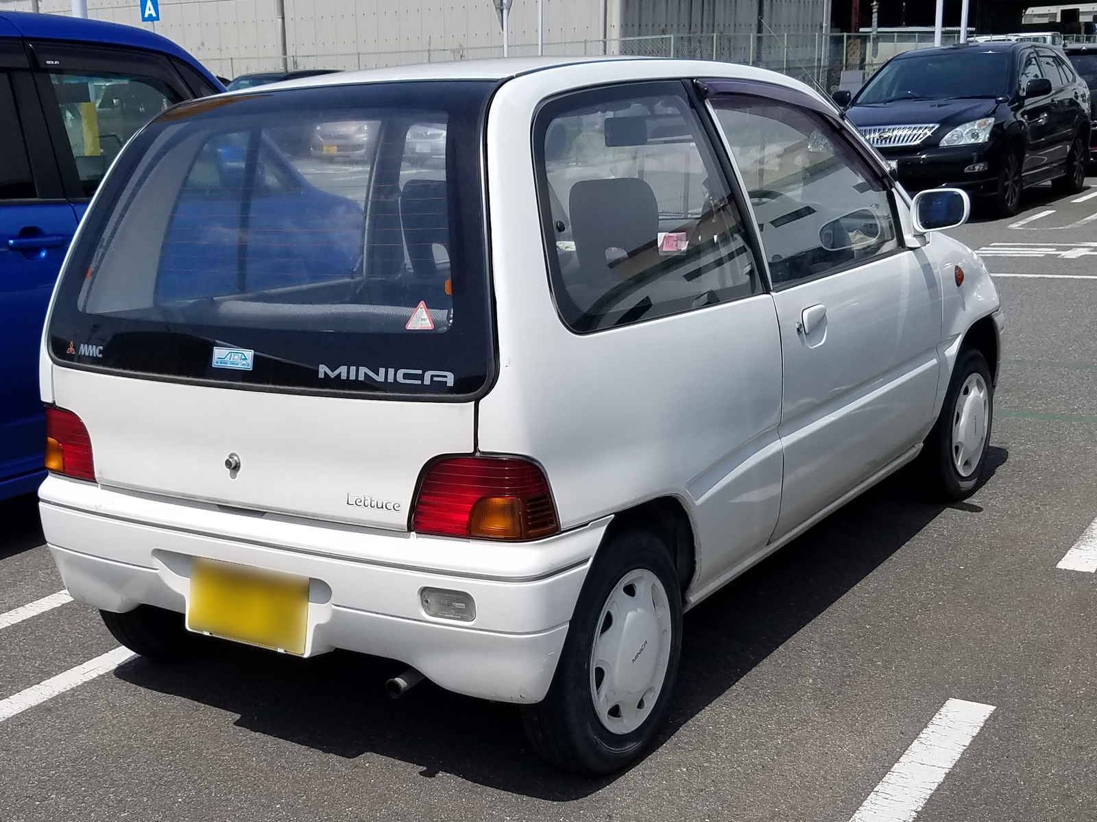 ミニカ レタス（550）